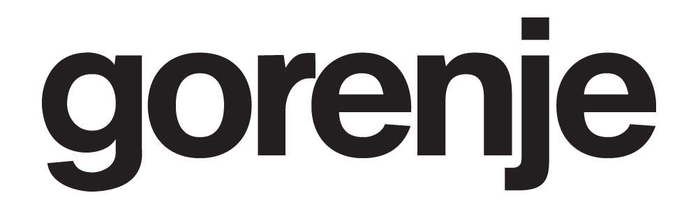 Gorenje text logo